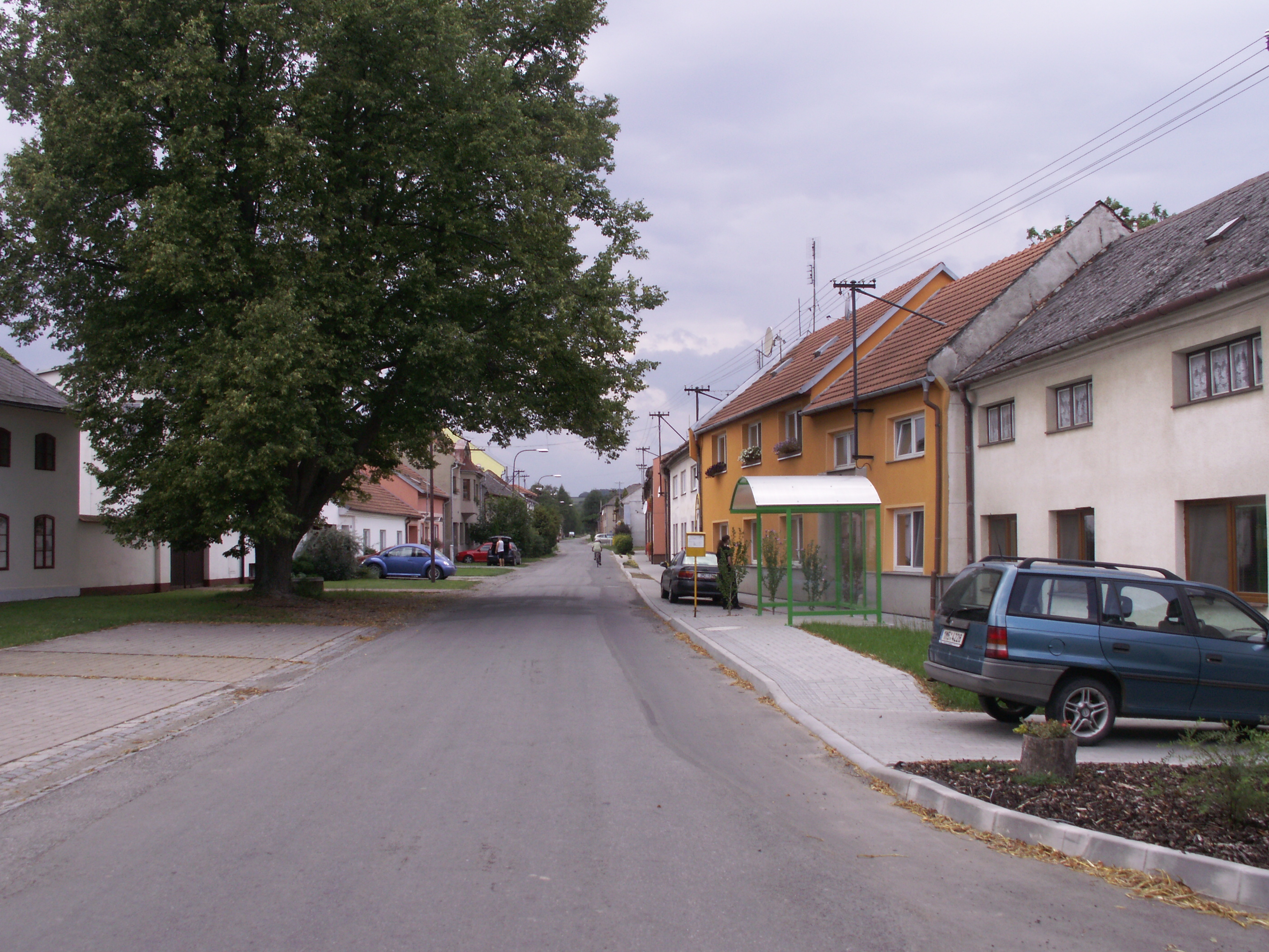 náves v Bílovicích (Bílovice-Lutotín), okres Prostějov